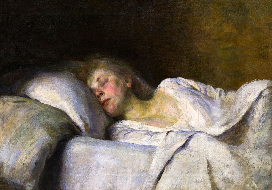 Sognando, olio su tela, Collezione Poscio, Domodossola